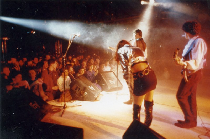 Foto de mi colección